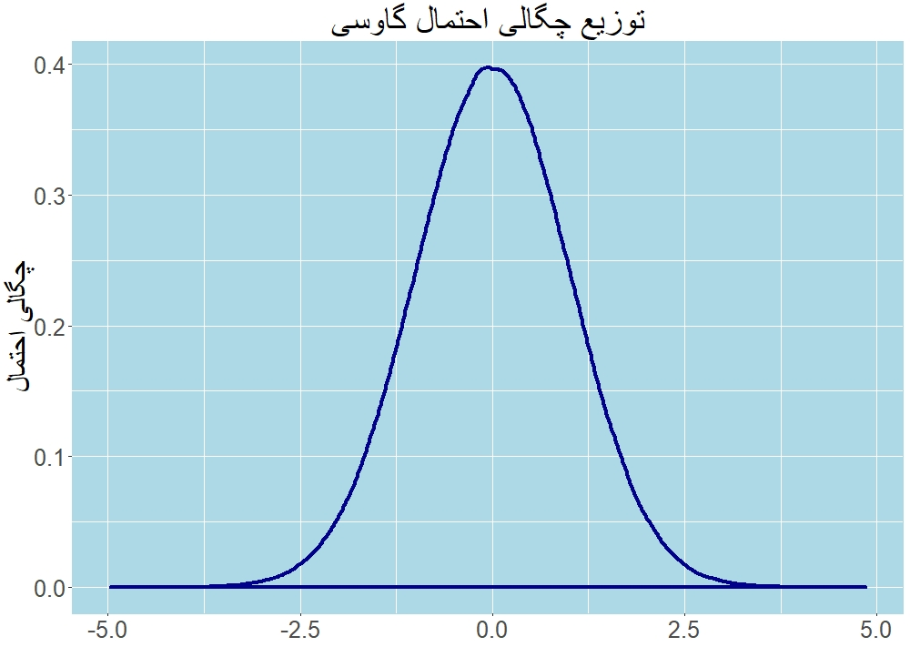 استاندارشده‌ی توزیع چگالی احتمال یک نویز گاوسی